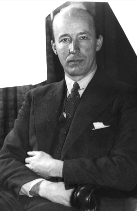 portrett, mann, høyesterettsadvokat, leder for Norges Fotballforbund, sittende knefigur.